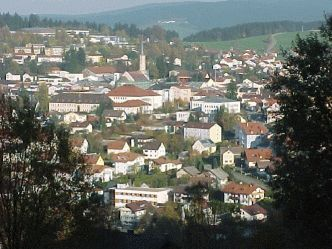 Freyung vom Geyersberg aus gesehen